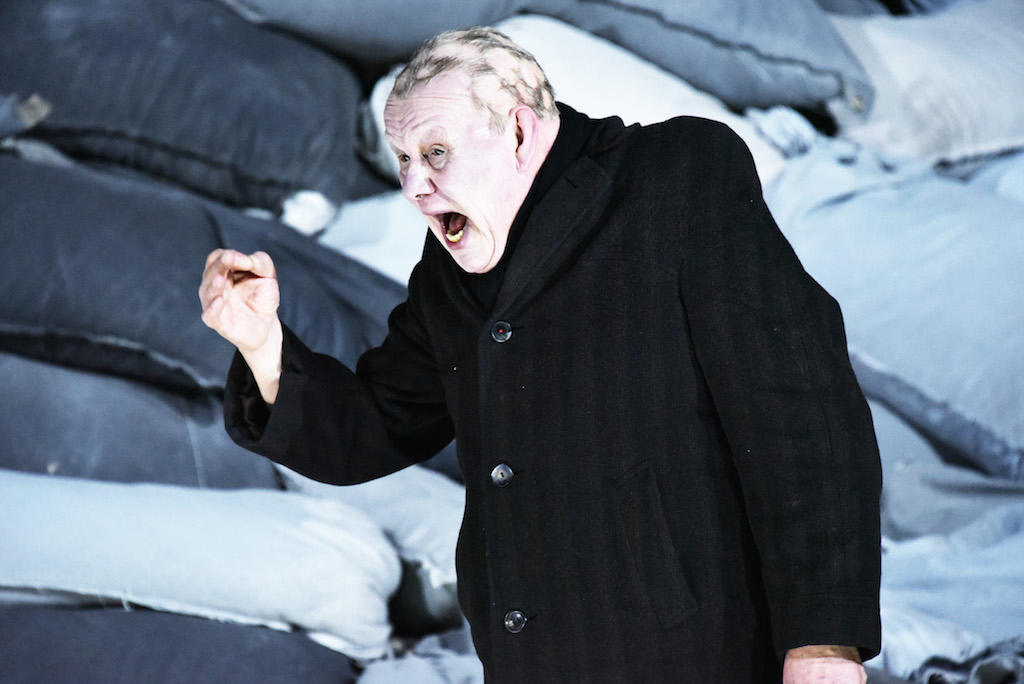 Die Macht der Finsternis Akademietheater Wien, 2015